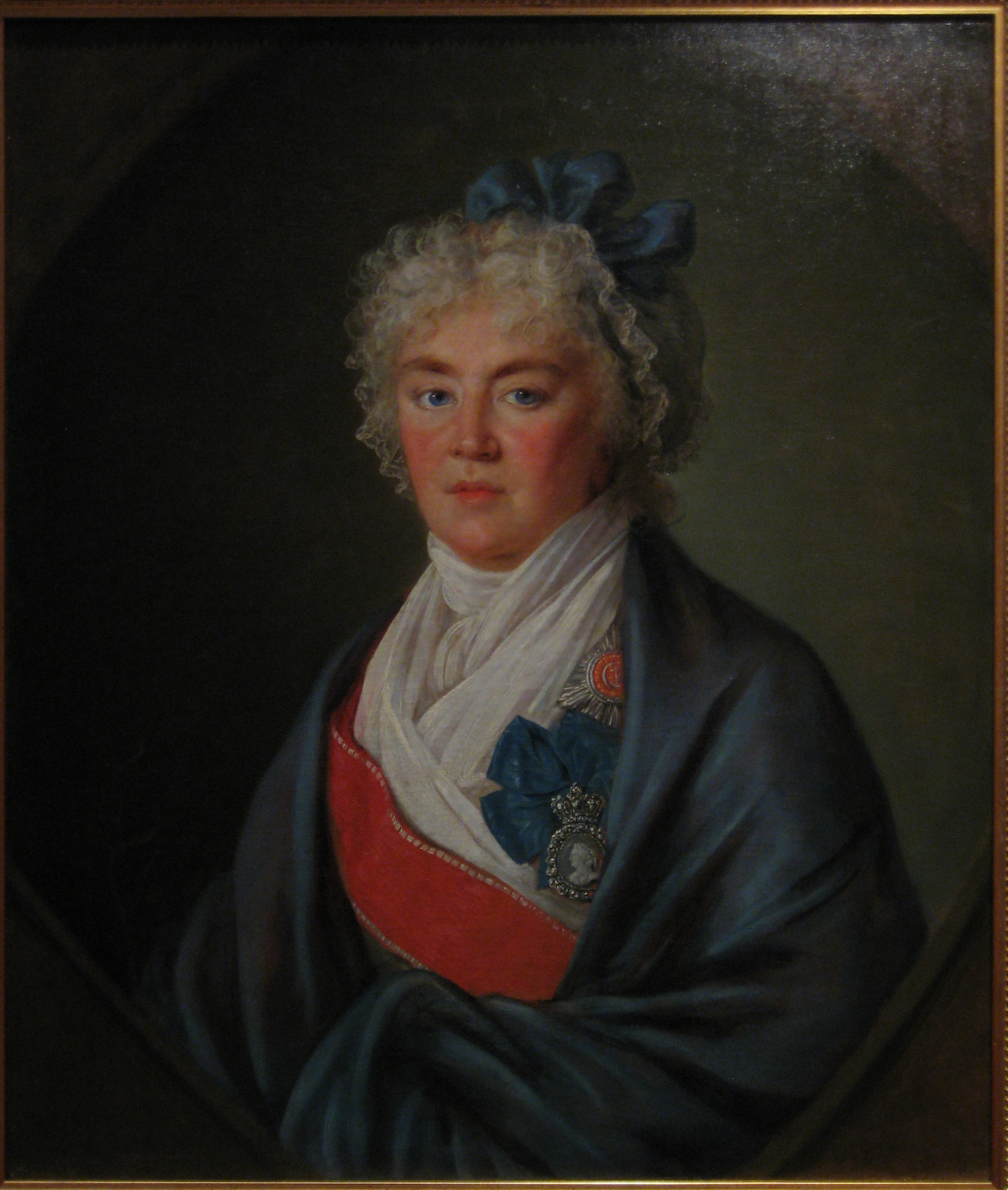 Дарья Петровна Салтыкова. Портрет работы неизвестного художника. Конец 18 - начало 19 века. ГИМ